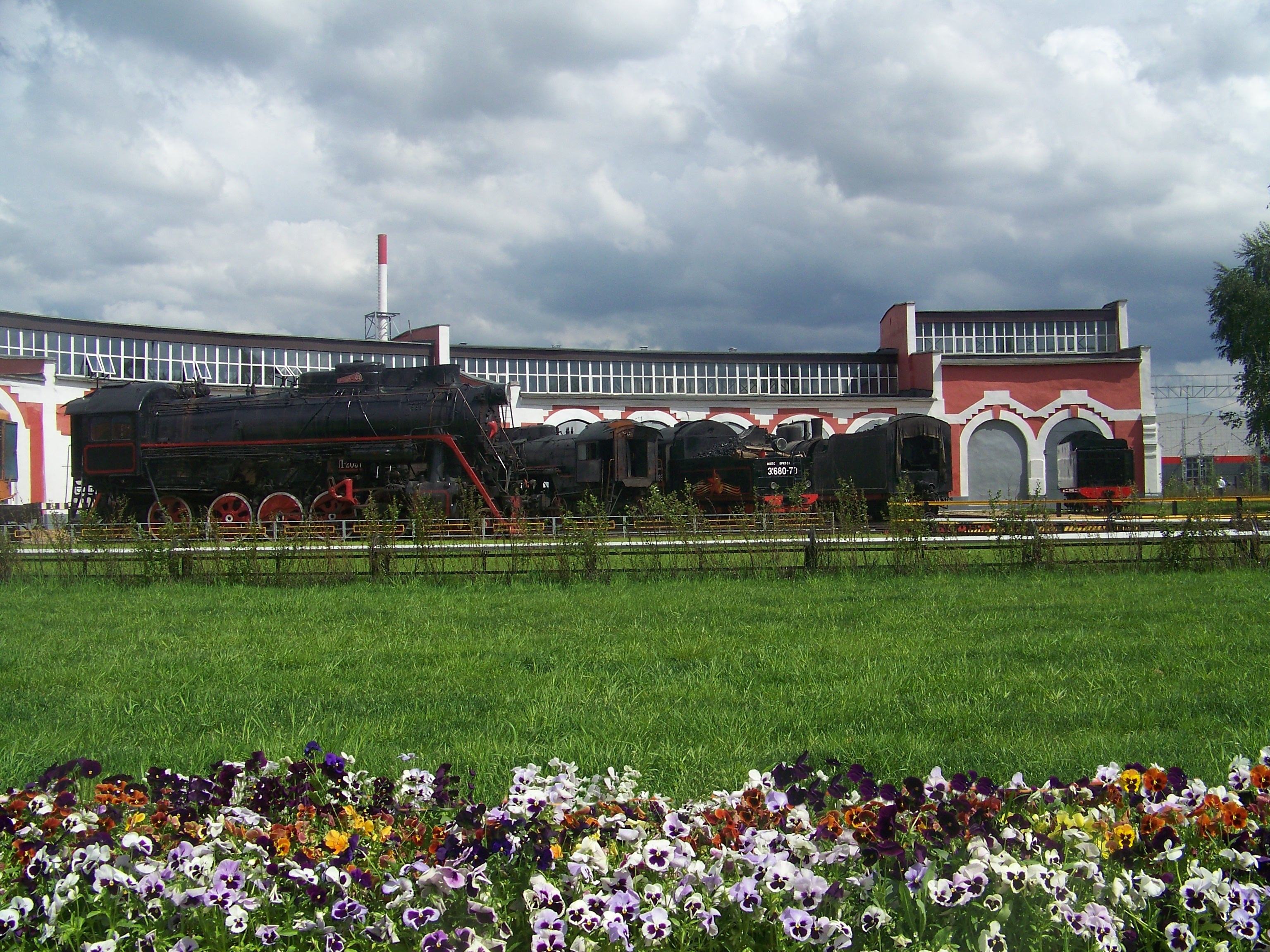 Паровозное депо Подмосковная